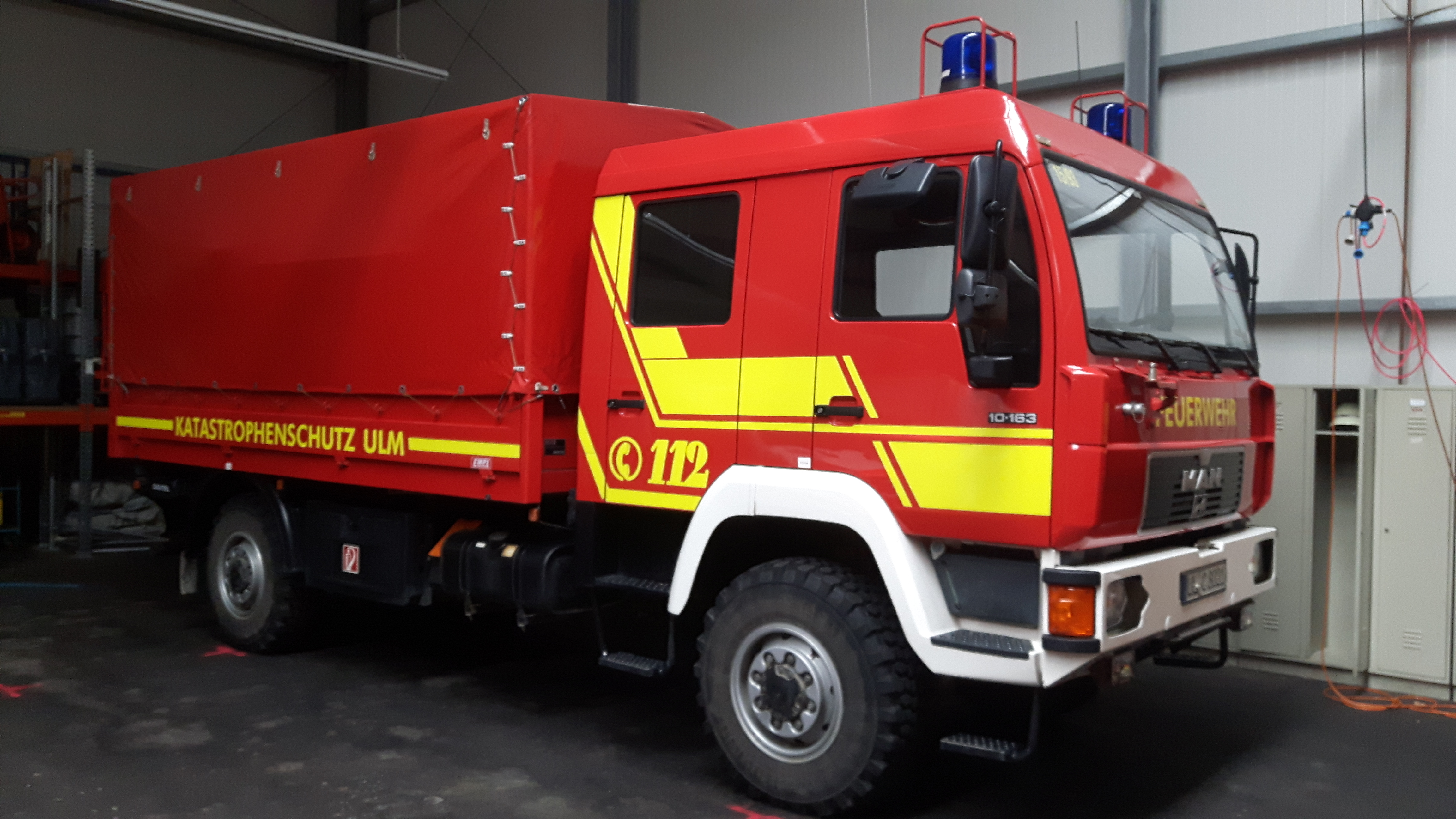 Dekontaminations-Lastkraftwagen Personen (Dekon-LKW P) des ABC-Zuges der Feuerwehr Ulm